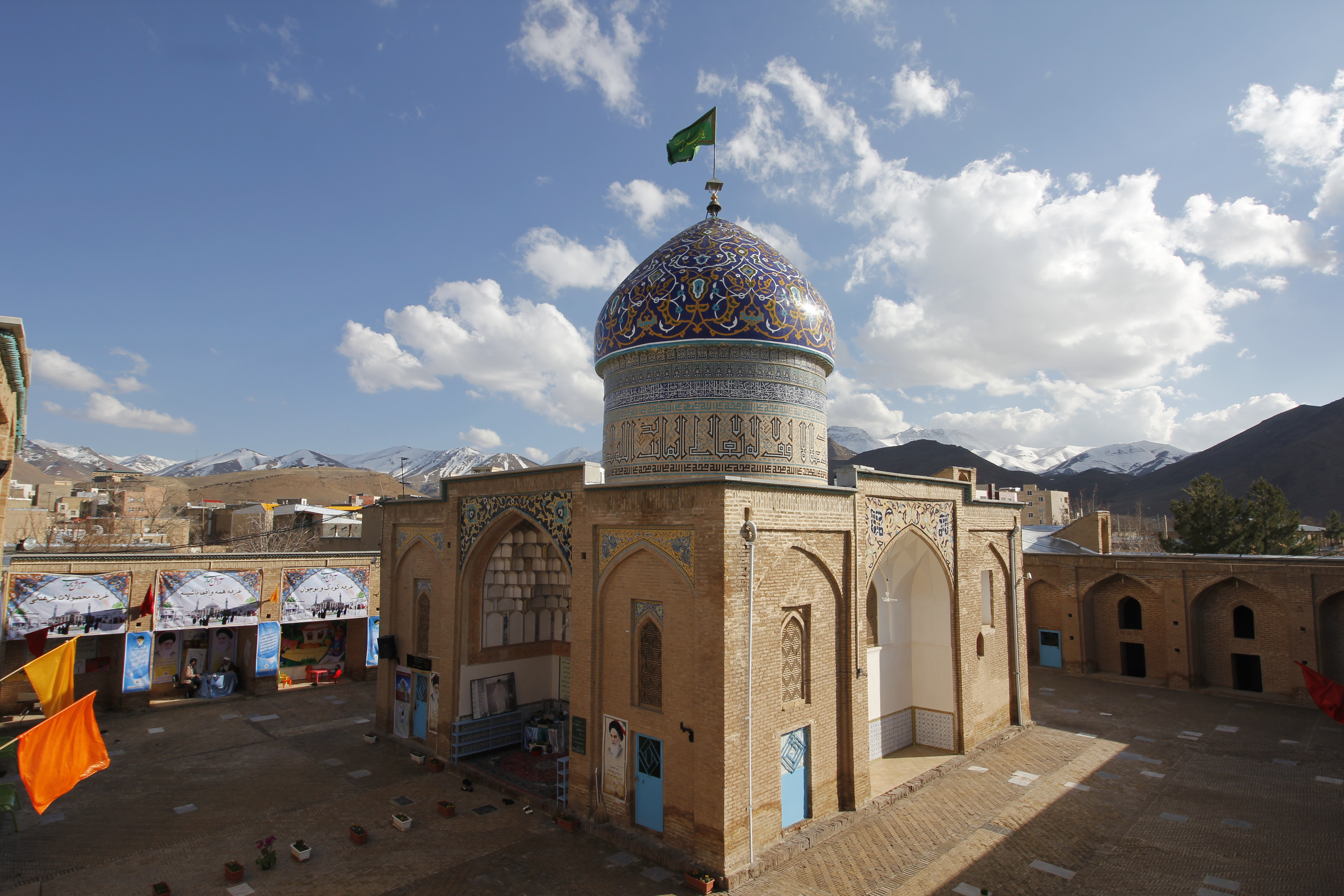 بناهای تاریخی تفرش